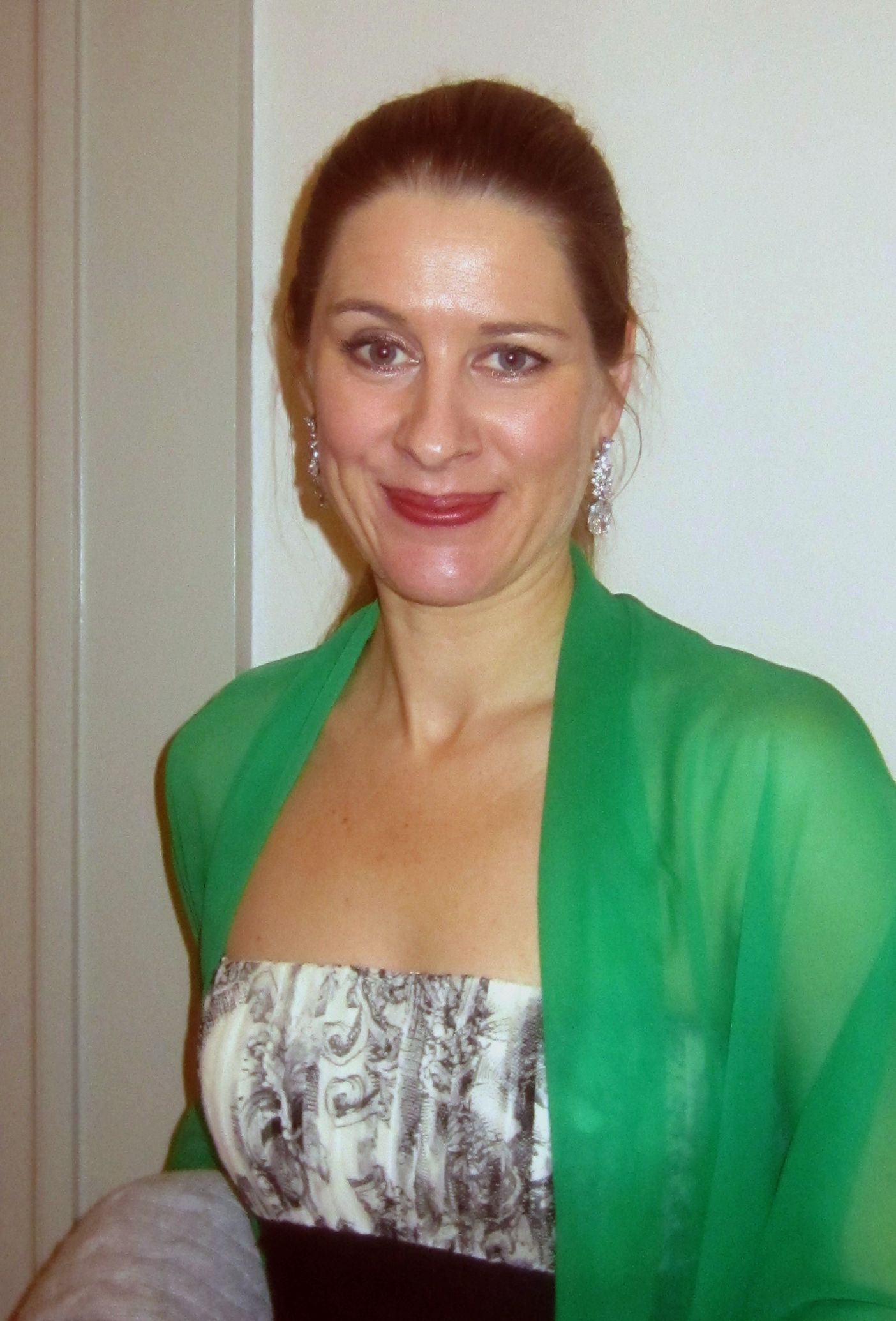 Malin Byström, född 3 september 1973 i Helsingborg, är en svensk operasångerska (lyrisk sopran).